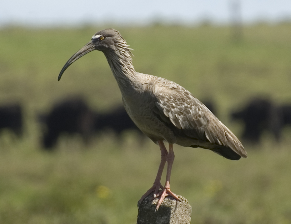 BANDURRIA MORA Harpiprion caerulescens